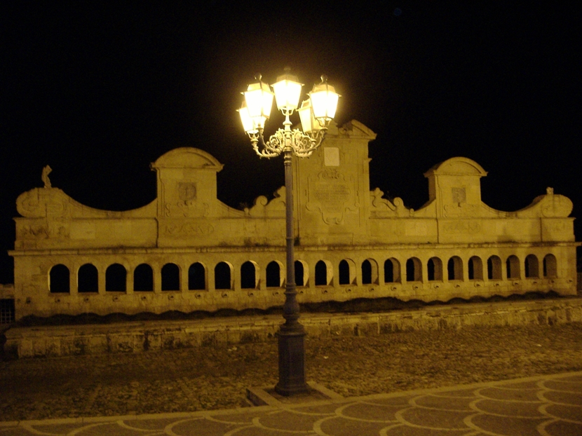 Leonforte: la meravigliosa Granfonte di sera.